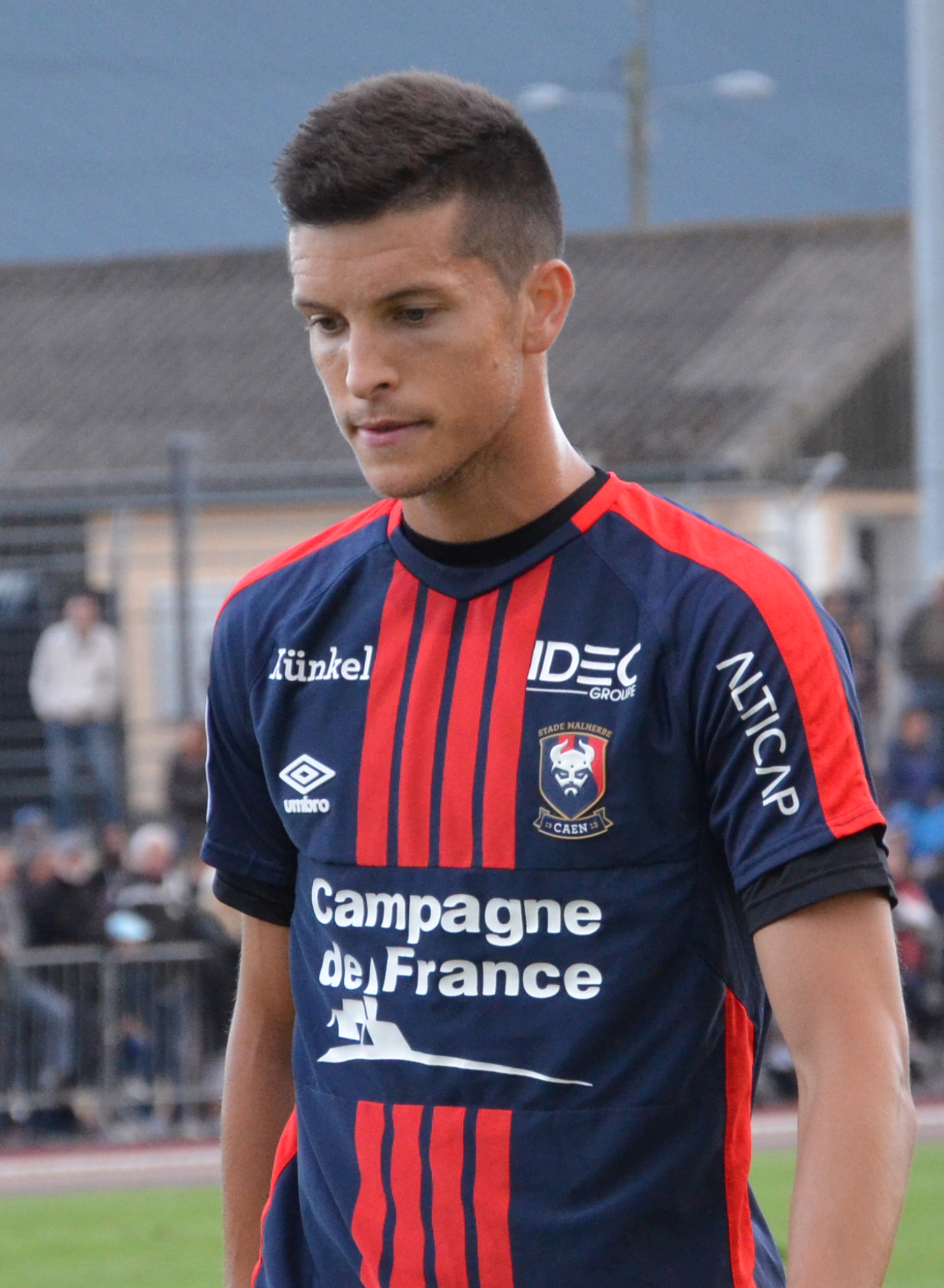 Photographie prise lors du match opposant le Stade rennais au SM Caen en match amical au stade Pierre-Compte de Vire le 22 juillet 2017. Ici, Stef Peeters.